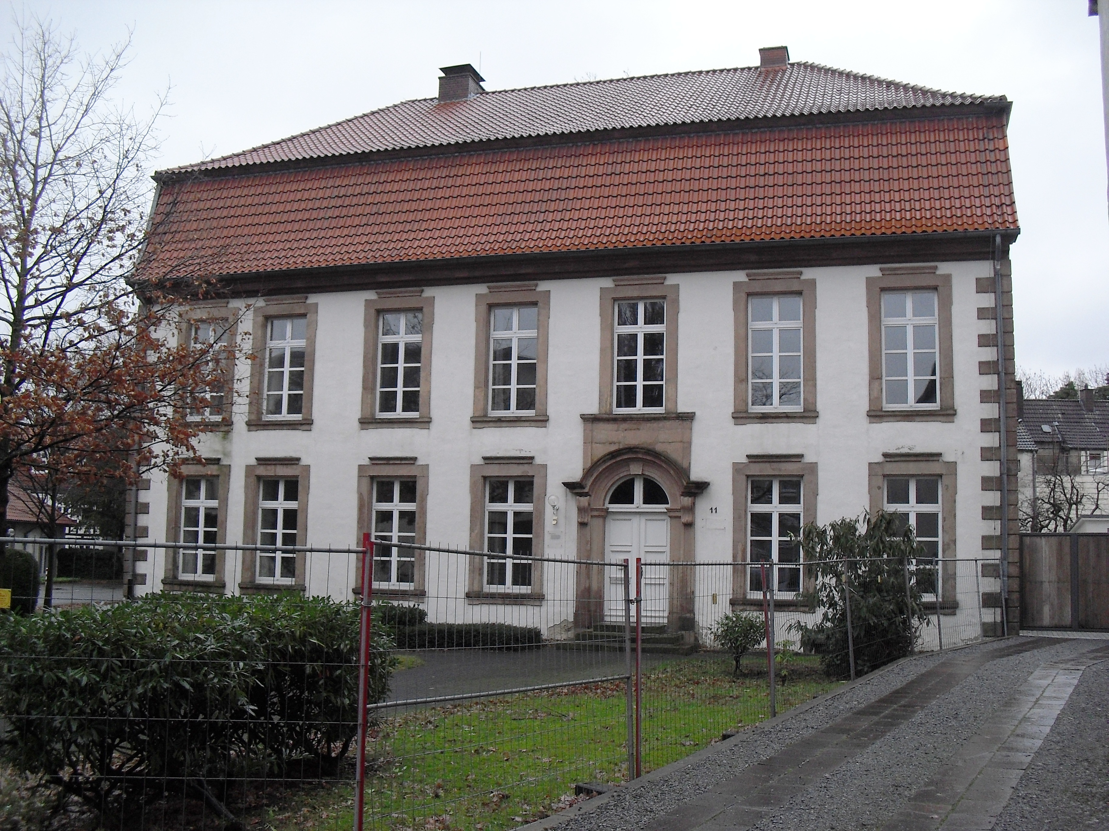 Hardehausener Hof in Paderborn. Von 1976 bis 2008 Nebenstelle Amtsgericht Paderborn. This is a photograph of an architectural monument.